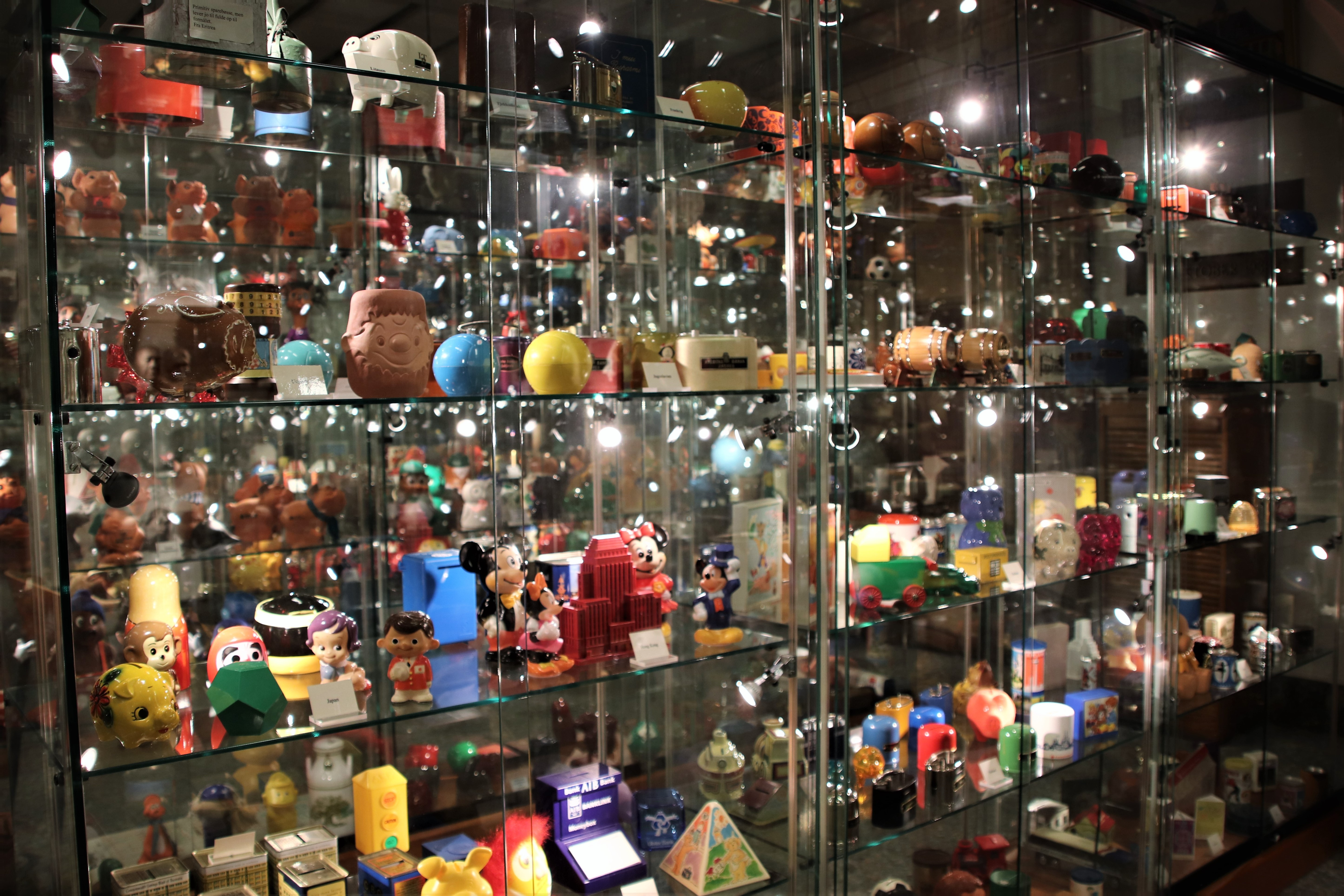 Sparebøssemuseet i Randers indeholder mere end 3.500 sparebøsser fra hele verden